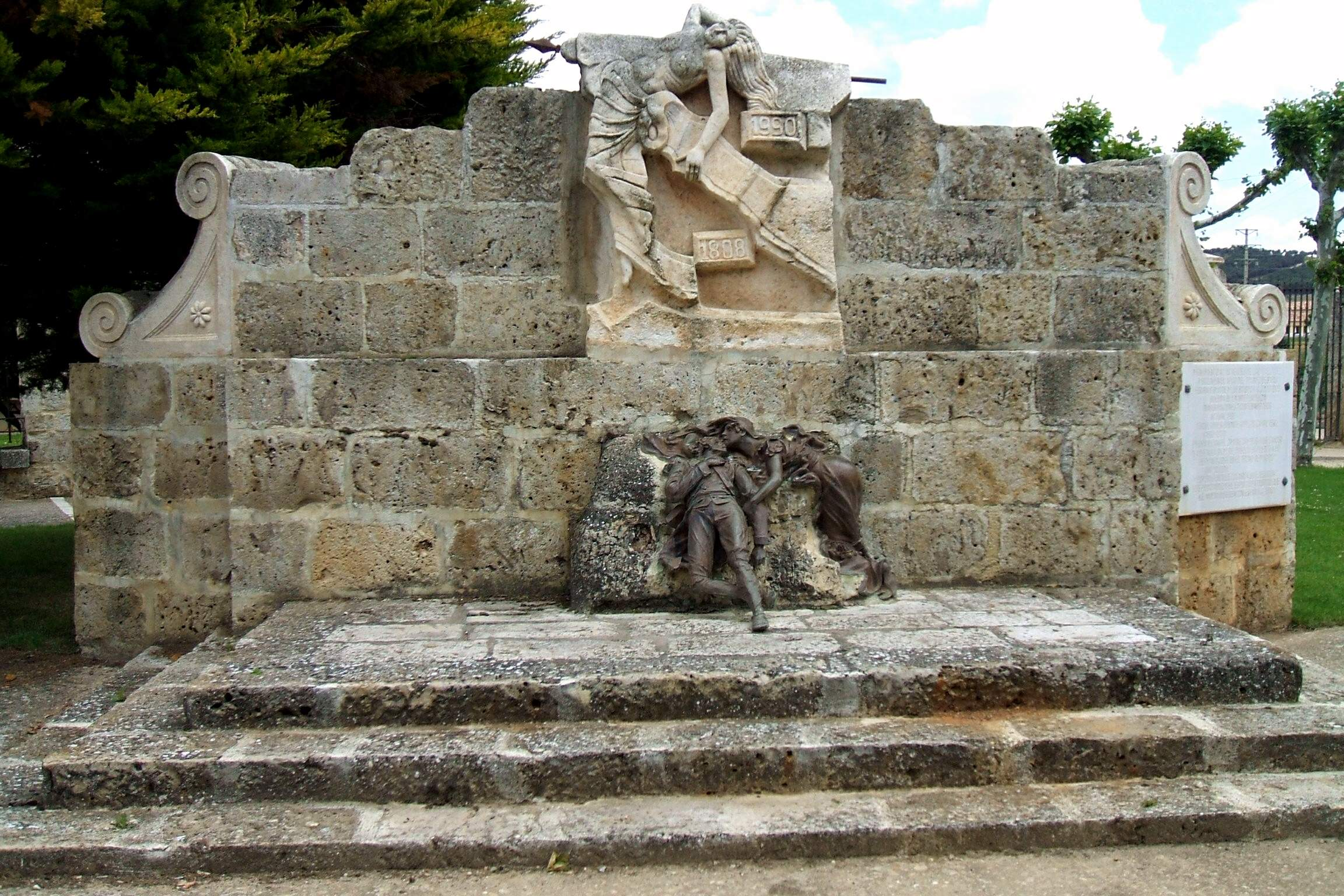 Medina de Rioseco - Monumento a la Batalla de Moclín